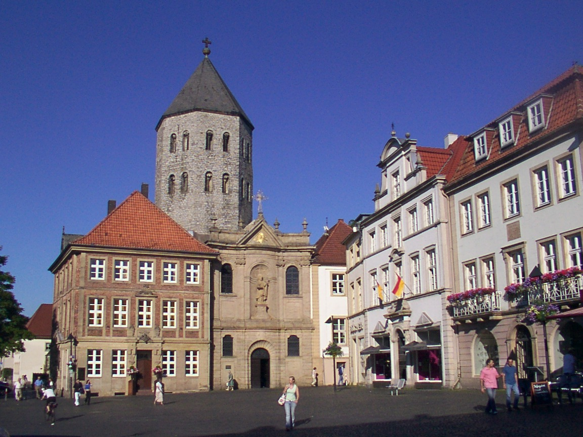 Paderborn: Markt mit Gaukirche zum heiligen Ulrich.